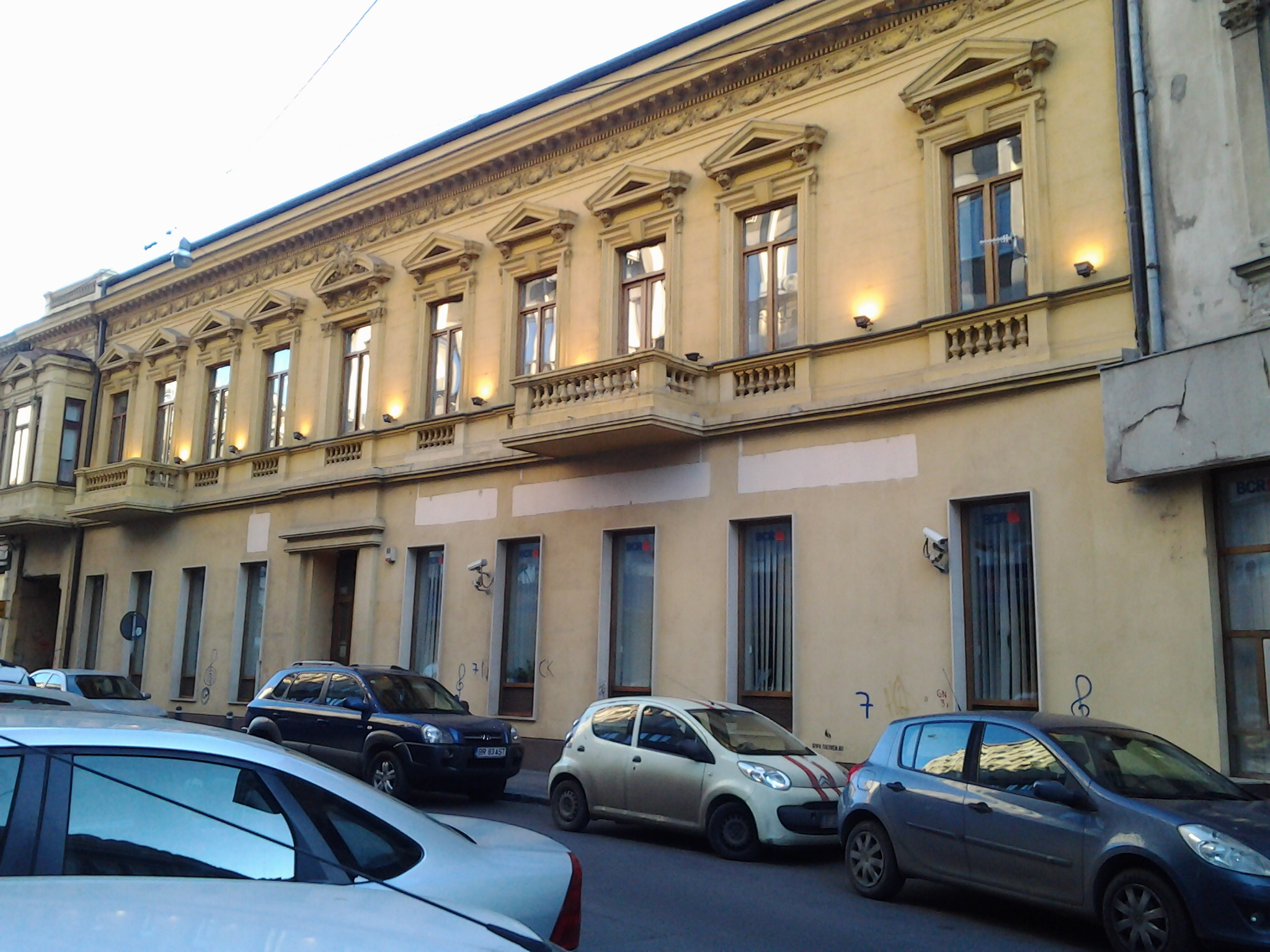 Casă Str.Doamnei